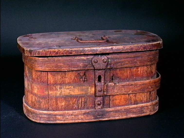 Lagget bomme av furu fra Fjaler i Sogn og Fjordane, ant fra 1800-årene. lengde 46 cm. Foto: Anne-Lise Reinsfelt / Norsk Folkemuseum, NF. 1921-1333.